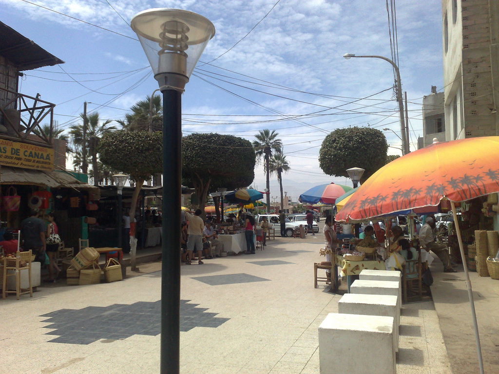 Boulevard in Chincha Alta, Peru